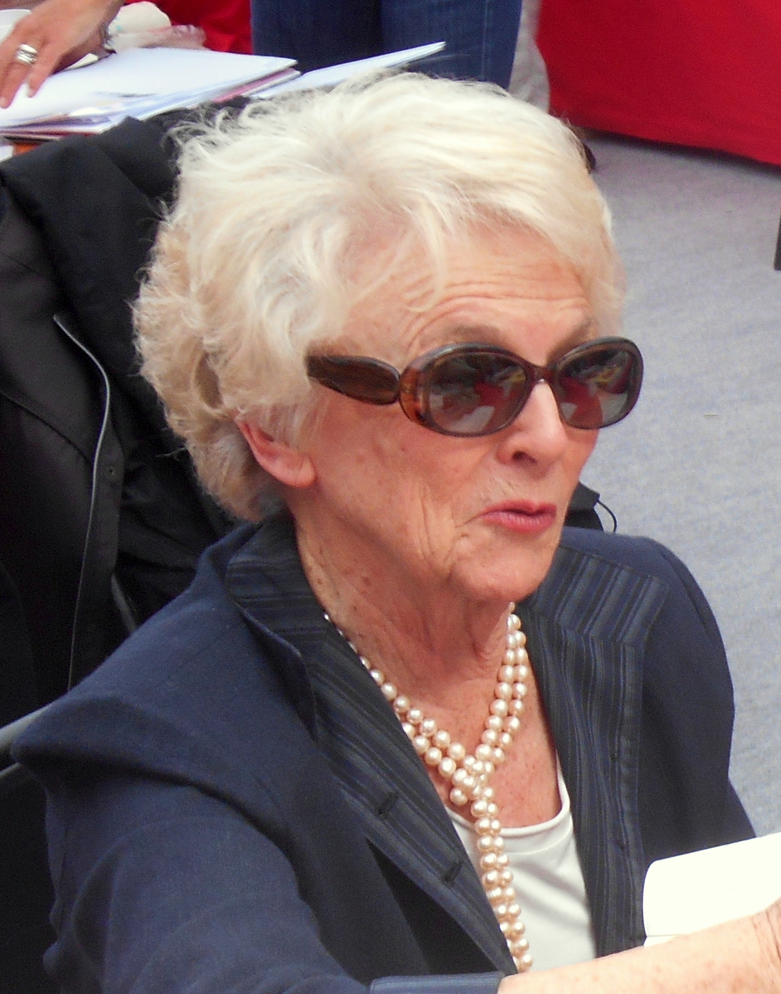 L'historienne Mona Ozouf au festival Étonnants Voyageurs de Saint-Malo en 2014.